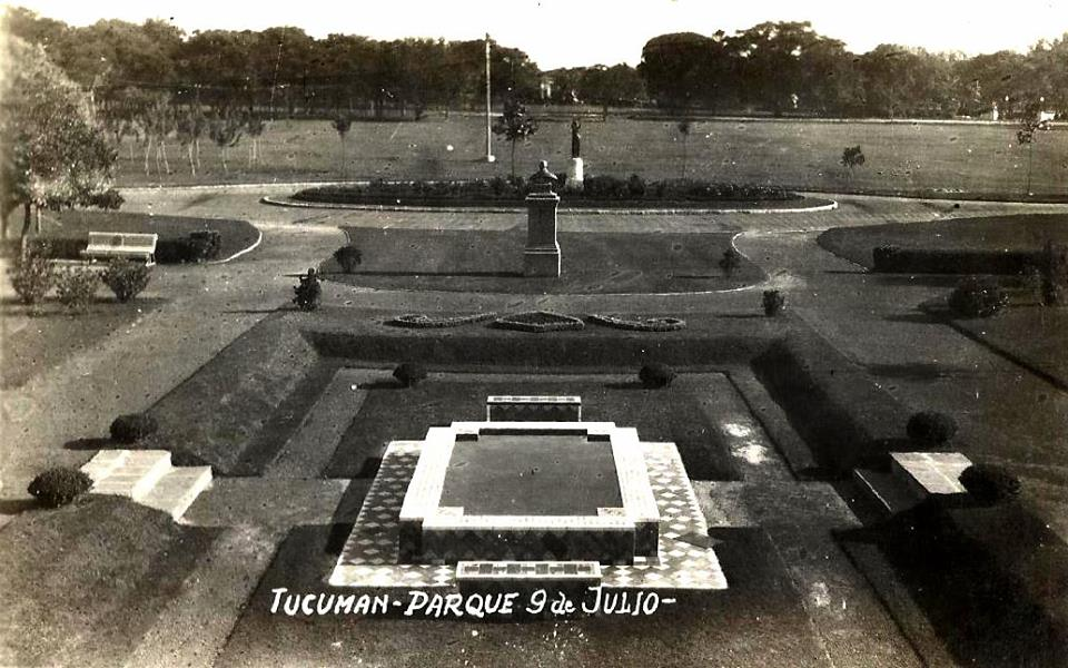 Imagen de los parterres del Parque 9 de Julio en el año 1938.